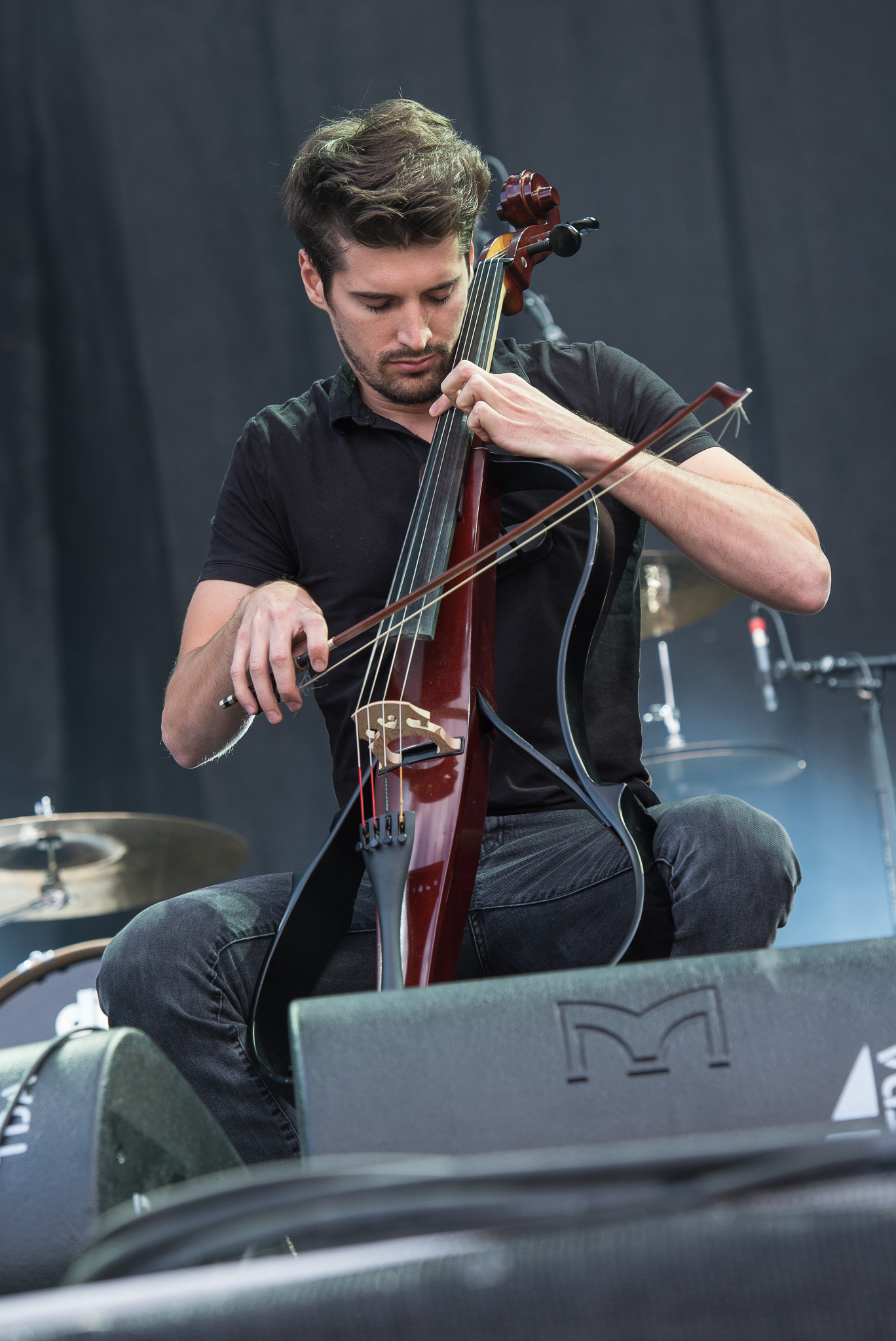 2Cellos,ARGO-Konzerte,Beck's Park Stage,Konzert,Livekonzert,Livemusik,Luka Šulic,Musik,RiP,Rock im Park 2017